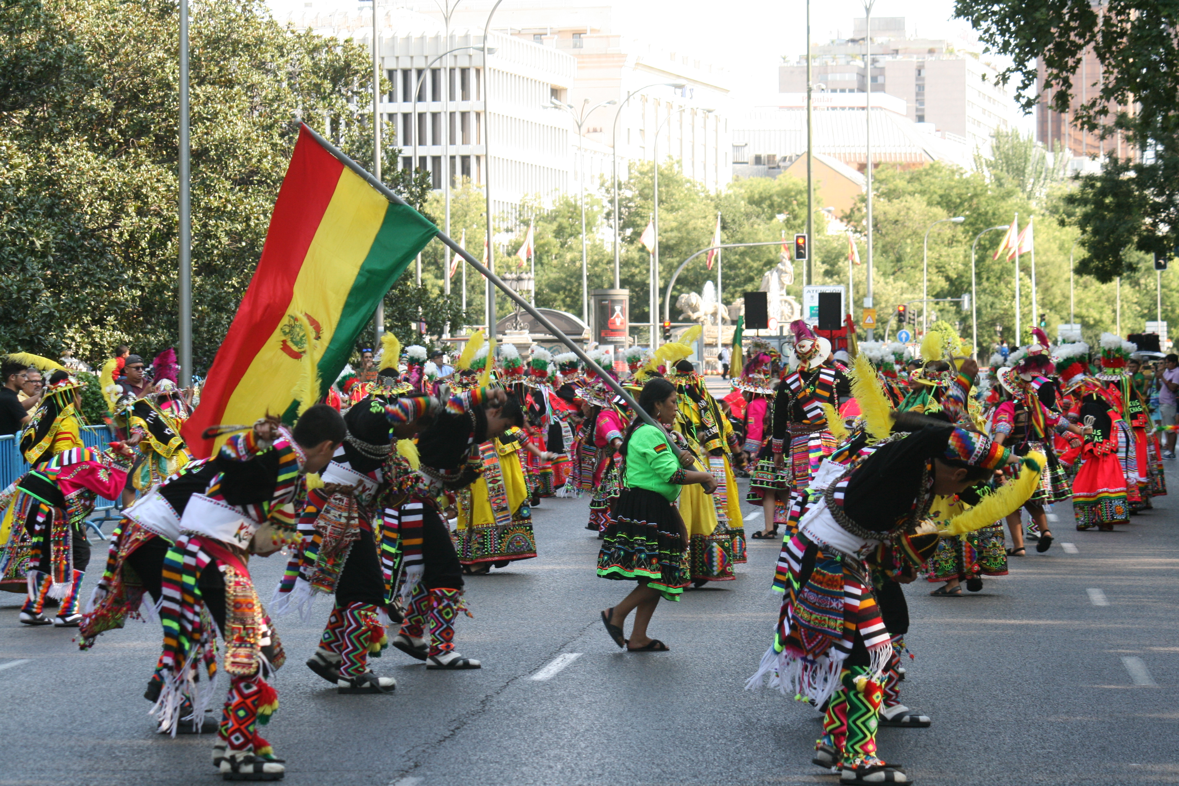 La colectividad boliviana en España celebra su fiesta en honor a la Virgen de Urkupiña. Nacho Murgui, alcalde en funciones, asiste a un pasacalles artístico cultural que recorre el centro de Madrid, una ciudad que recibe, integra y enriquece. Hoy el Paseo del Prado se ha llenado de color, canción y alegría. La colectividad boliviana residente en España ha realizado su tradicional tributo a la Virgen de Urkupiña (Patrona de la Integración de Bolivia), con un pasacalles artístico y cultural para mostrar que Madrid es una ciudad que “recibe, integra y enriquece”.